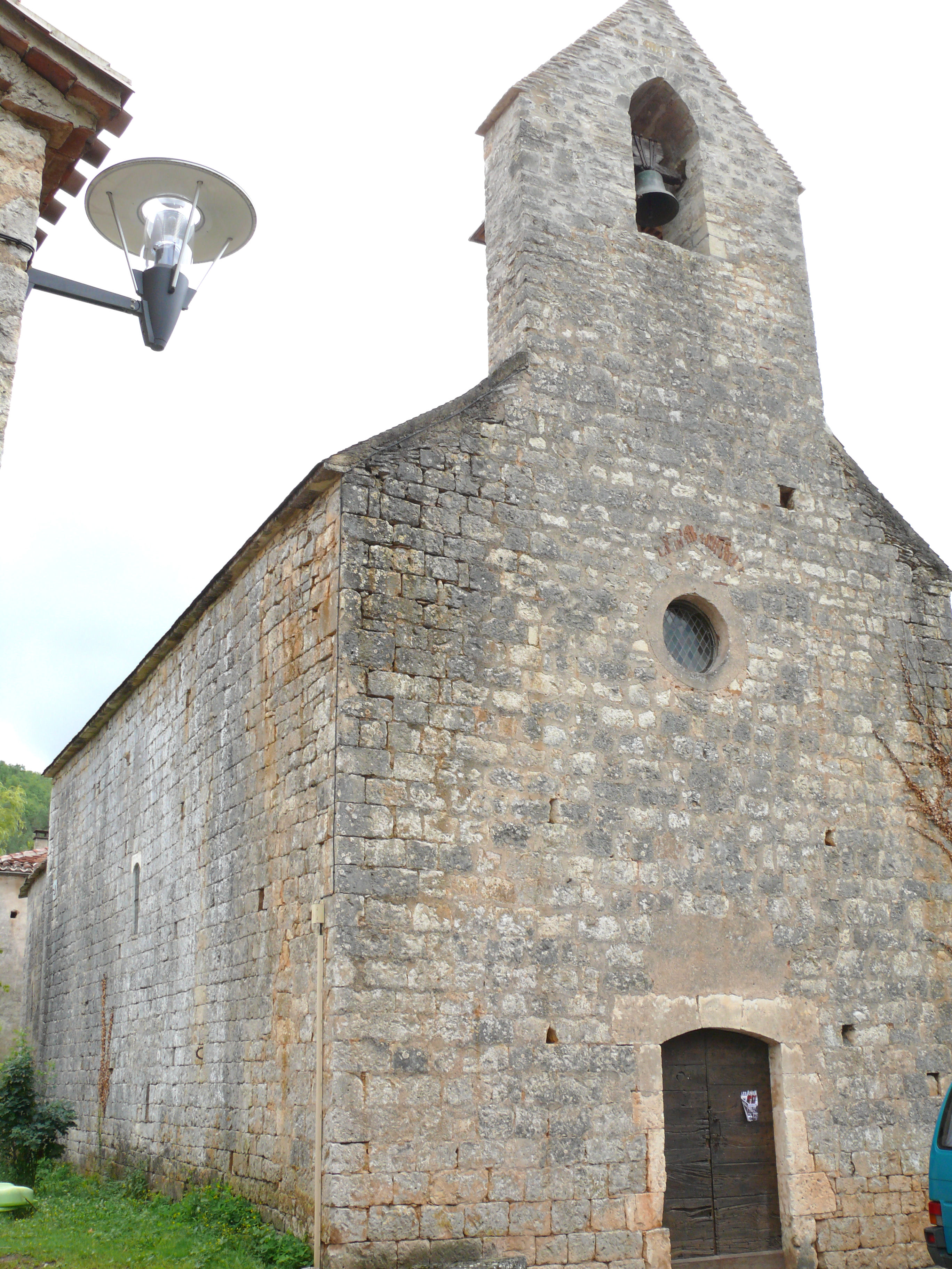 La Masse - Eglise